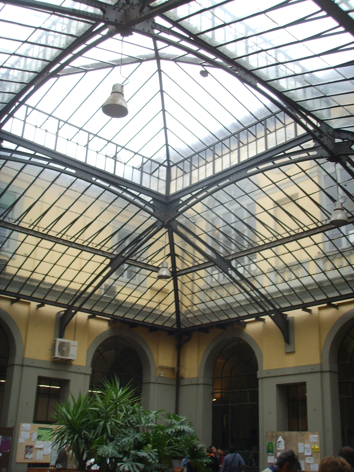 Palazzina reale delle cascine, cortile 01